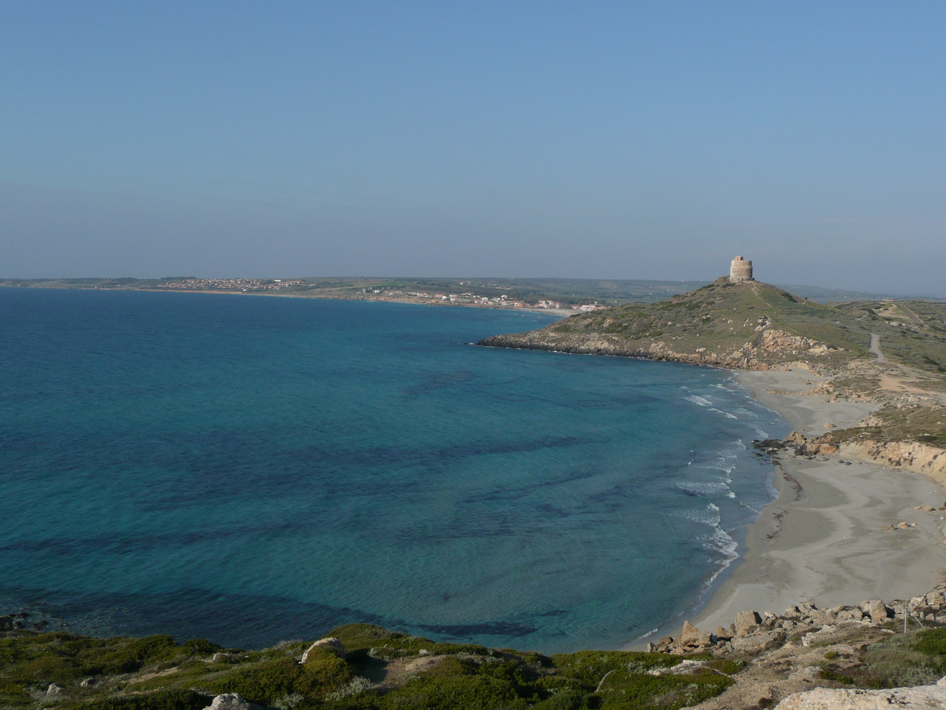 Tharros, san giovanni sinis, sardinia, italy